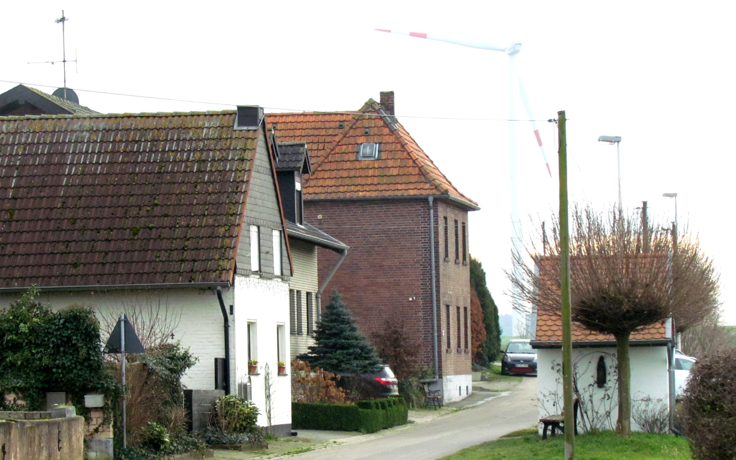 Ortschaft Baumen